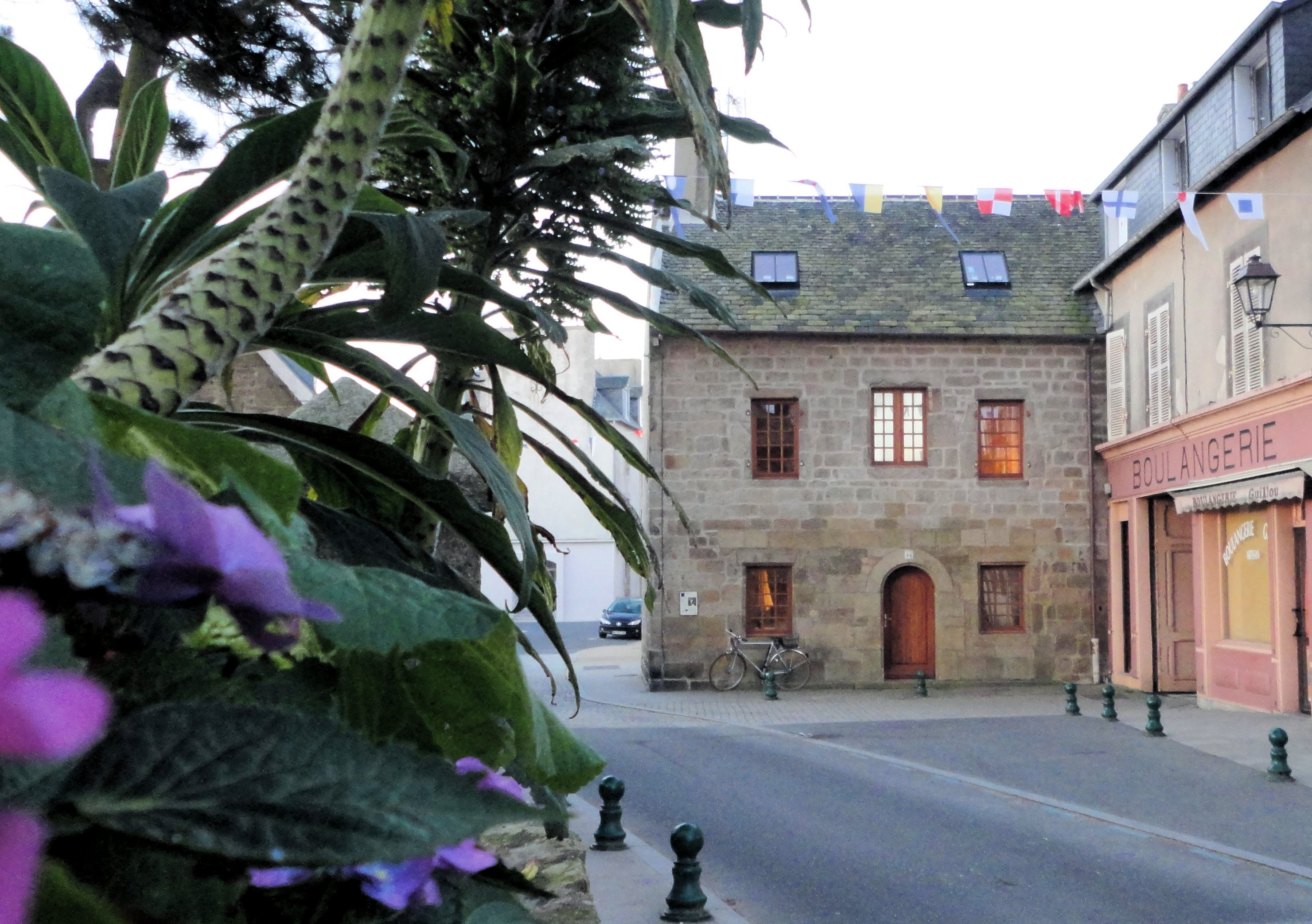 Roscoff 2012 ,maison qui se visite pendant les journées du patrimoine